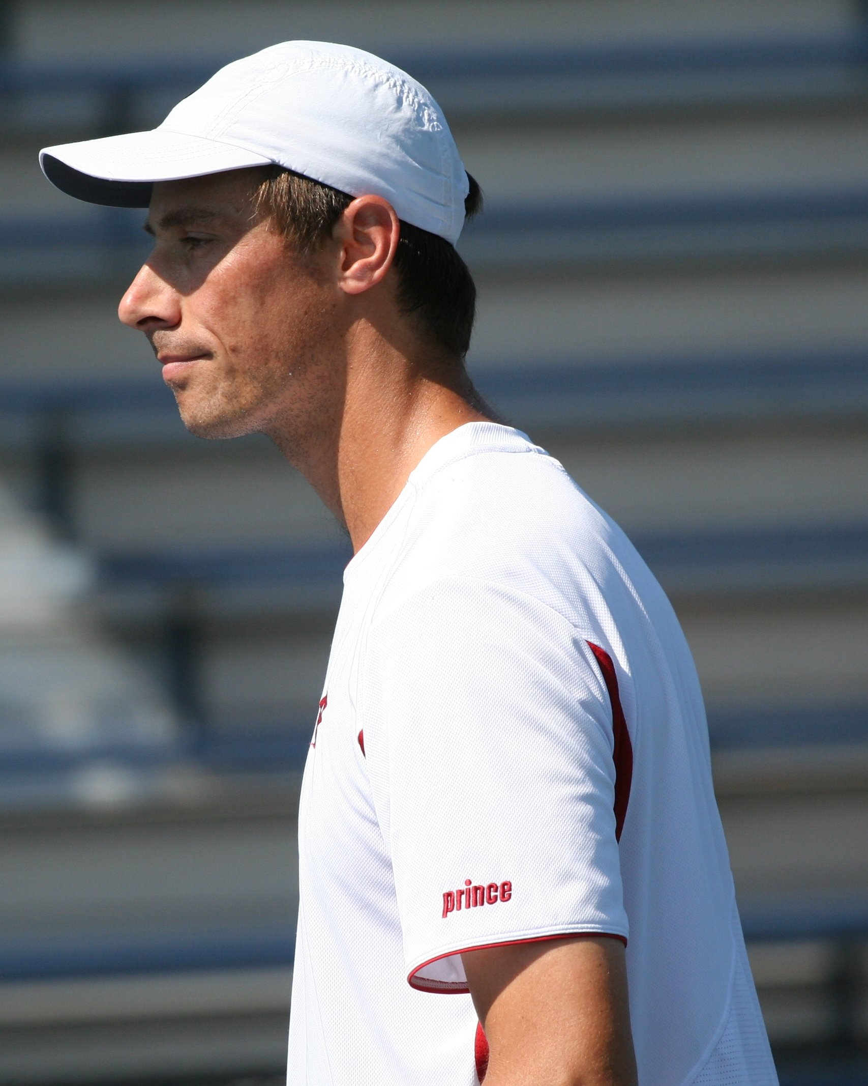 U.S. Open Saturday, Sept. 5, 2009